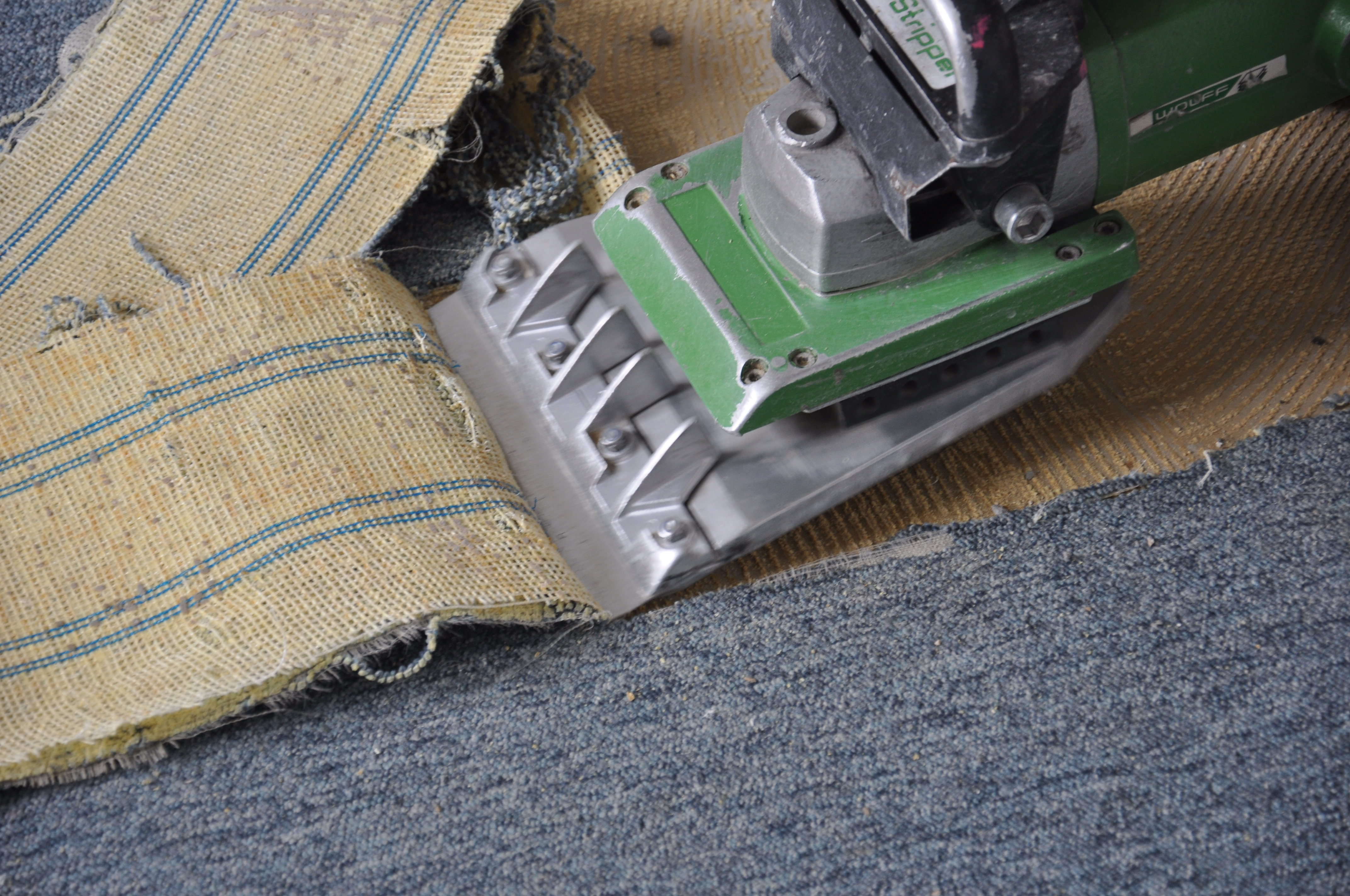 Arbeitsbeispiel eines Teppich-Strippers, mit: Scherklinge und abgetrennter Teppichbahn